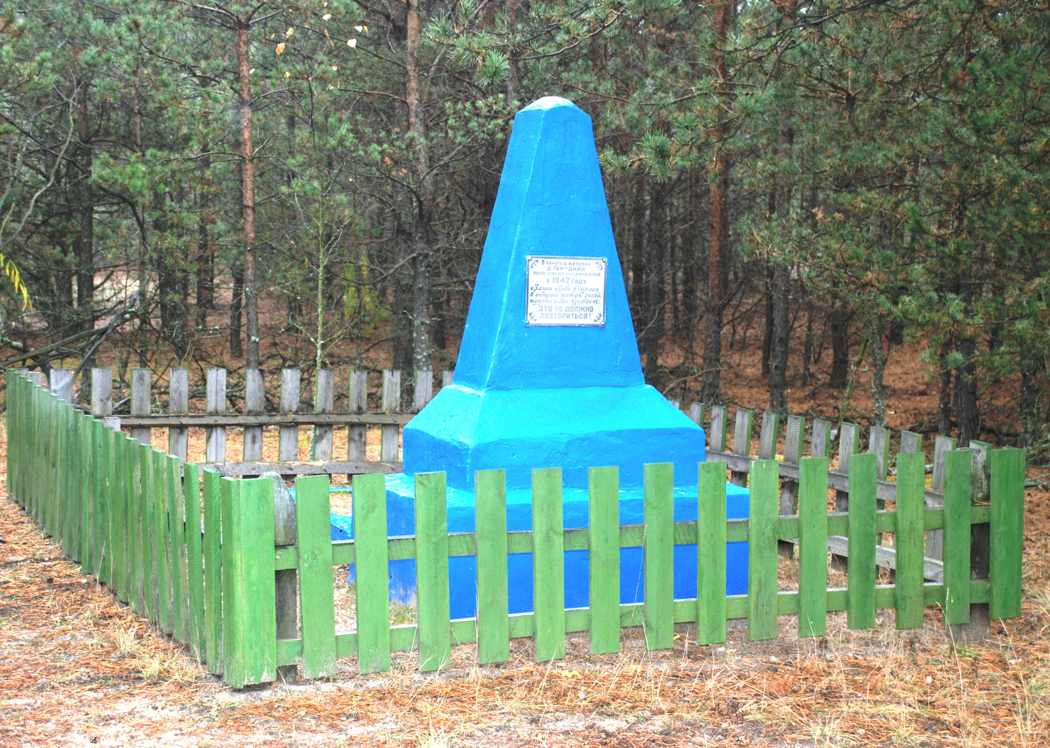 Памятник на месте расстрела и братской могилы евреев из Городнянского гетто. Установлен в 1960-е годы выжившими евреями и потомками убитых.